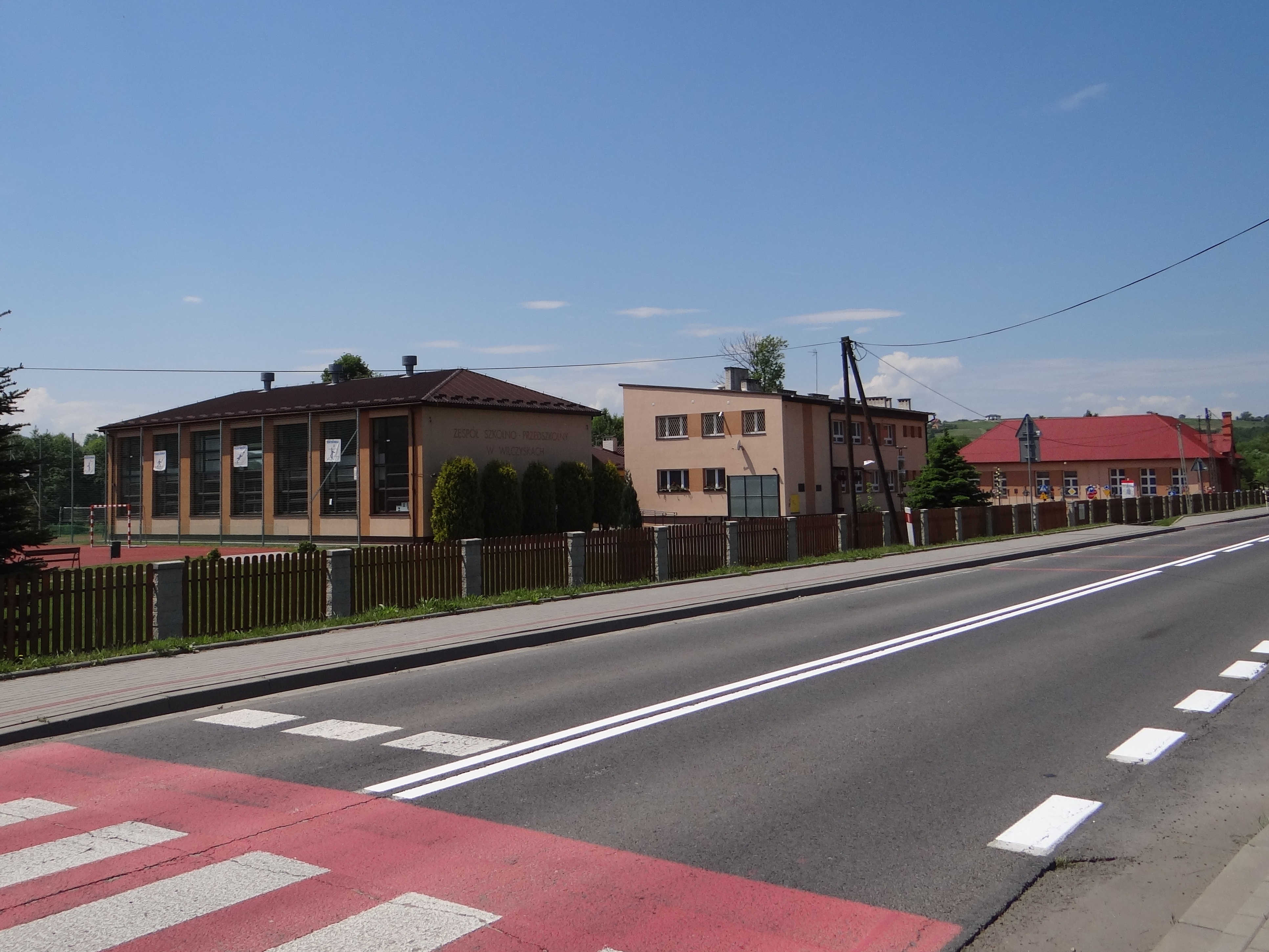 Szkoła w Wilczyskach